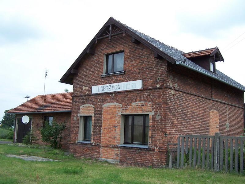 Polska, Dobrzyca, woj. wielkopolskie, powiat pleszewski, gmina Dobrzyca, budynek dawnej stacji PKP po zlikwidowanej Krotoszyńskiej Kolei Dojazdowej. W budynku wykuto nowe okna, zamurowano drzwi. Pozostałością jest jedynie napis DOBRZYCA. Tory i perony oraz mijanka zostały przez PKP rozebrane.